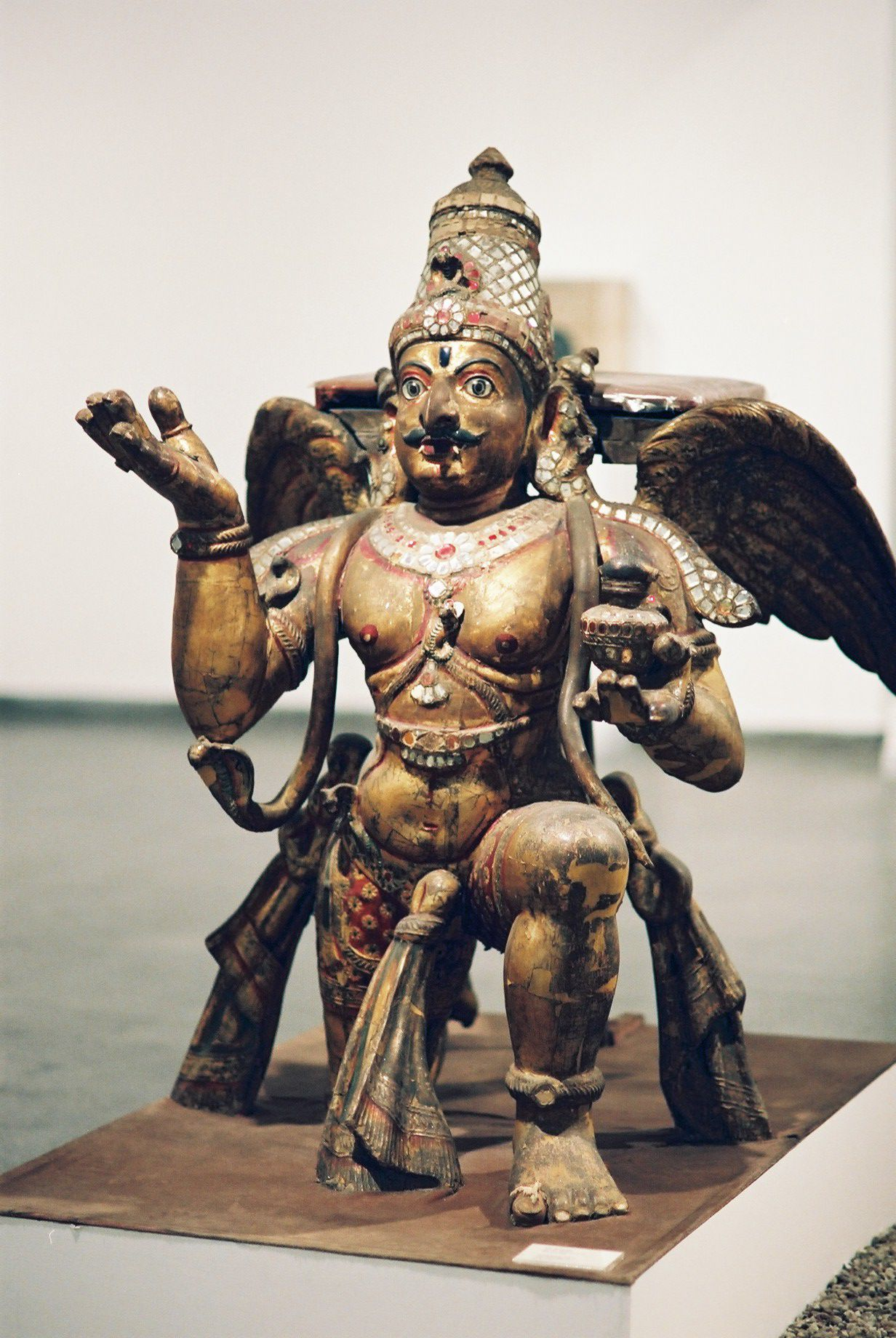 ガルダ (Garuda) は、インド神話に登場する神鳥で、ヴィシュヌ神の乗り物。佛教では八部衆(二十八部衆)の迦楼羅(かるら)にあたります。ちなみに、ガルーダ・インドネシア航空の「ガルーダ」も元を辿れば彼(？)です。(2005/01/22 National Museum, Delhi, INDIA)Who are you?